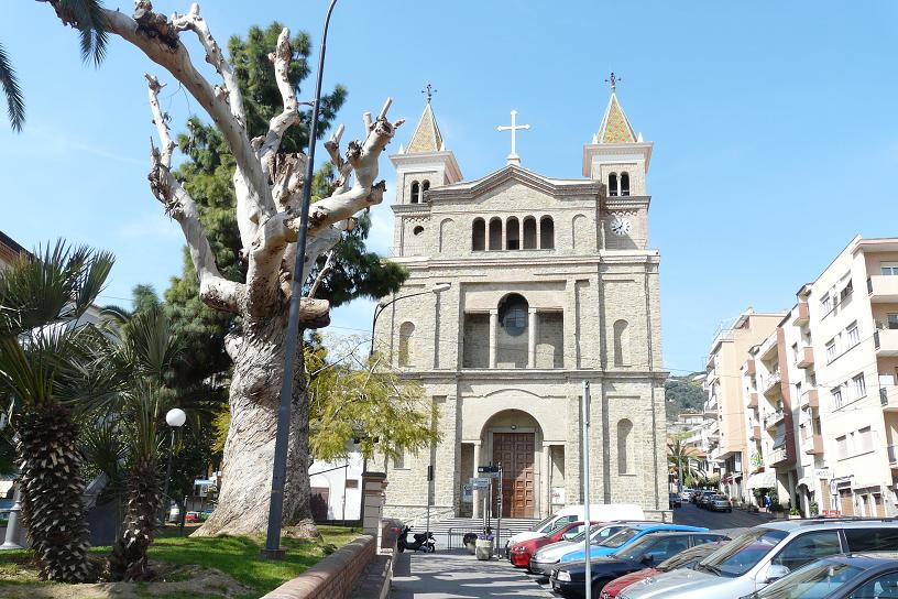 Chiesa dei Santi Giuseppe ed Antonio, Arma di Taggia, Taggia, Liguria, Italia